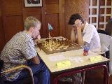 Erwin l'Ami